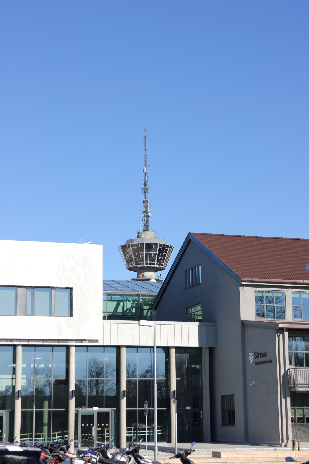 Strinda vgs. med Tyholttårnet i bakgrunnen - foto: Ragnar Ydse